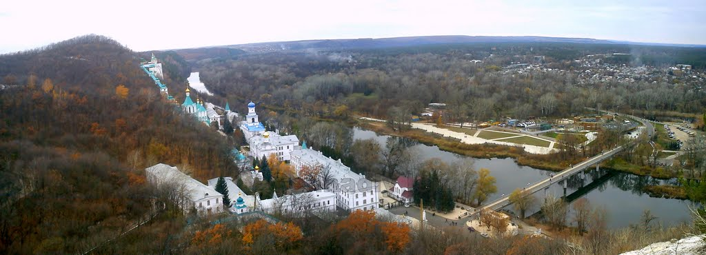 Святогірський Успенський монастир (мур.):, Святогірськ, м.Слов'яногірськ - 1